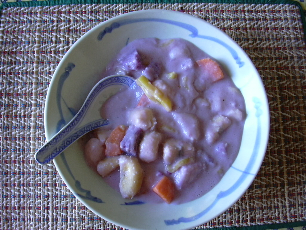 Filipina kokoslaktaĵo - Lulu-insulo, Kanado